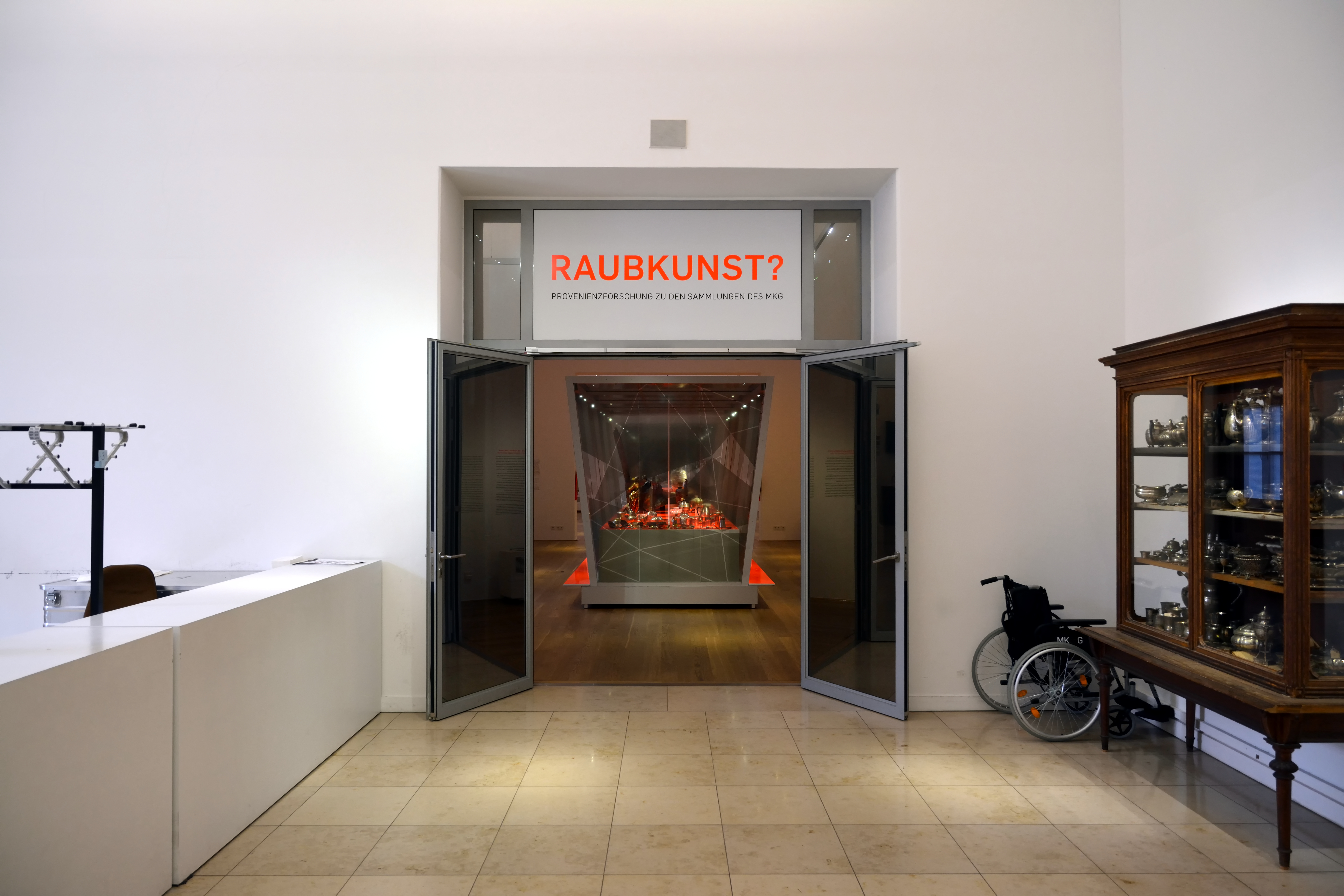 Impressionen vom GLAM-Event "Wiki Loves Musik" in Hamburg. Ein Ausstellungssaal mit Stücken unklarer Herkunft mit dem Titel "Raubkunst?".